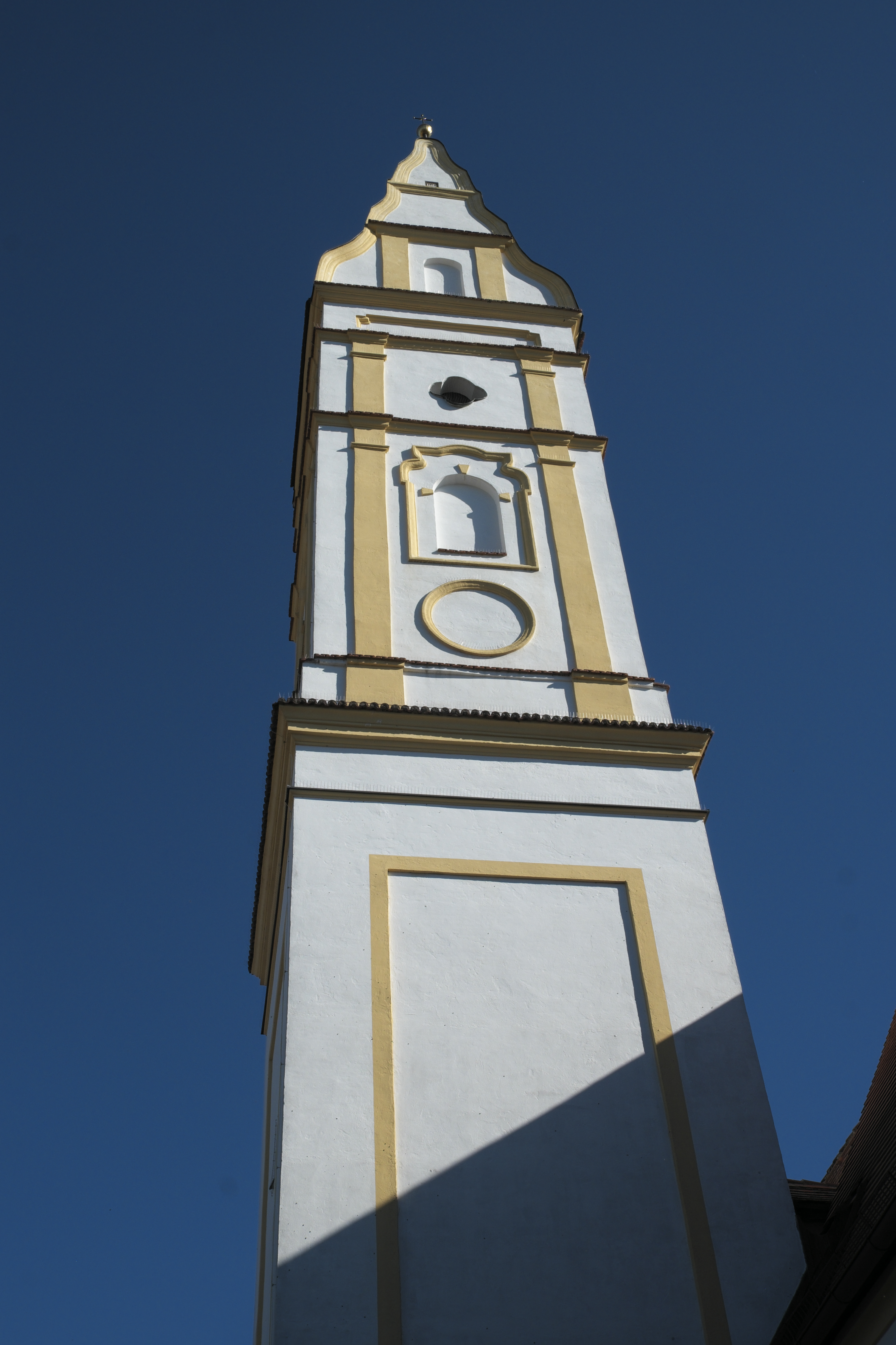 Katholische Pfarrkirche St. Petrus und Paulus in Petzenhausen, einem Ortsteil von Weil (Oberbayern) im Landkreis Landsberg am Lech (Bayern/Deutschland)